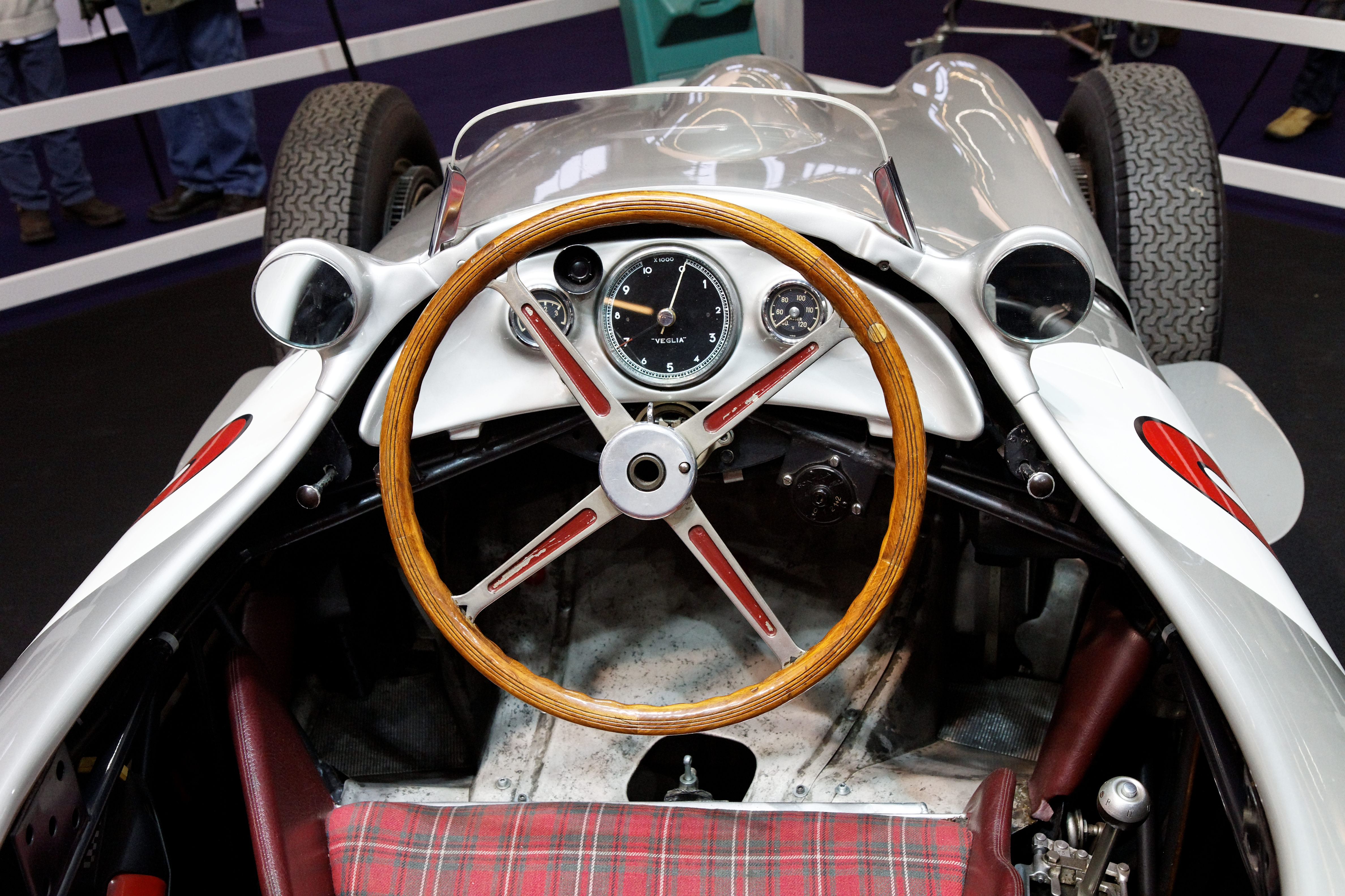 Photographie prise lors du salon rétromobile 2011 à Paris, porte de Versailles.